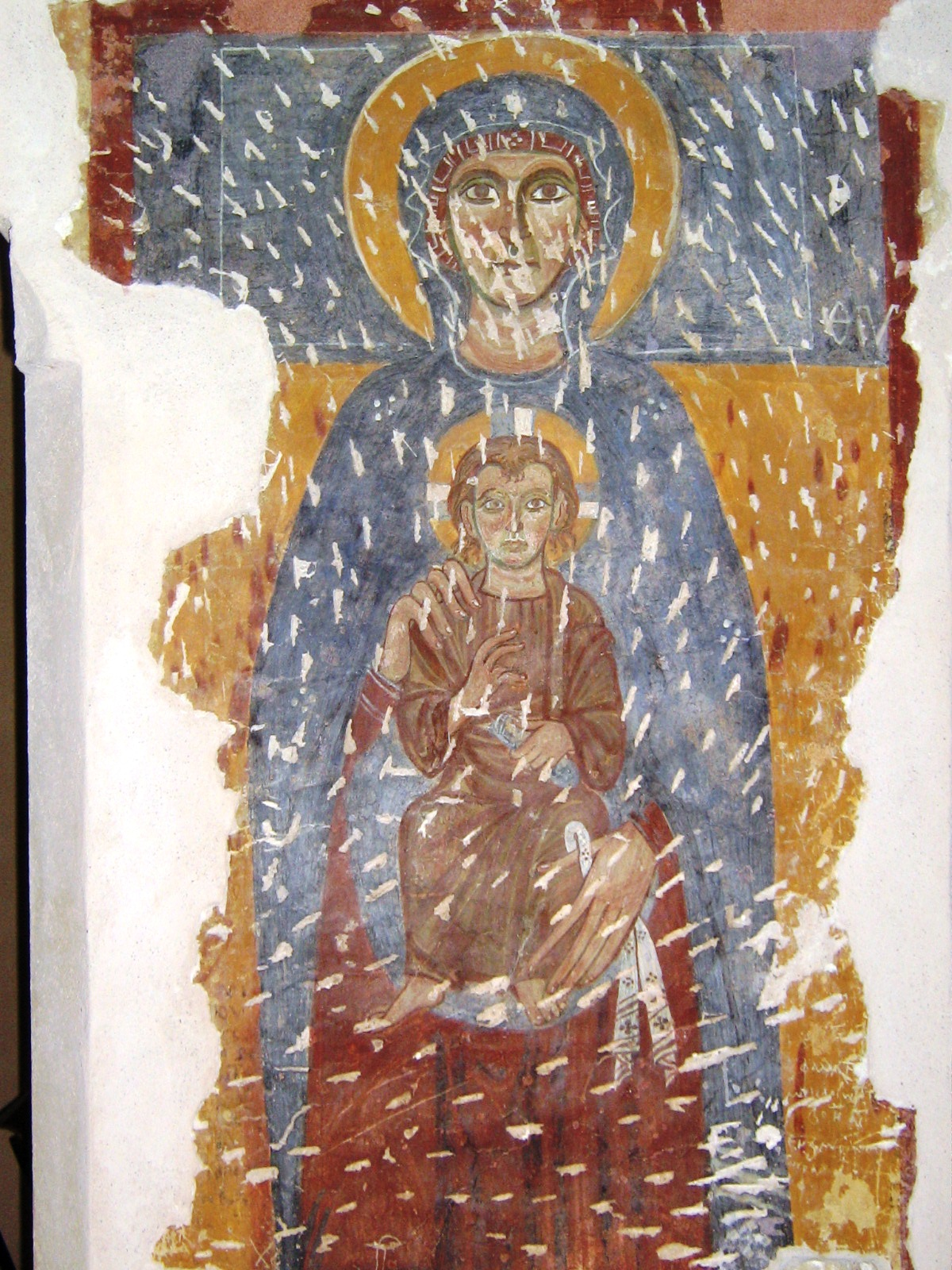 Chiesa di Casaranello Affreschi